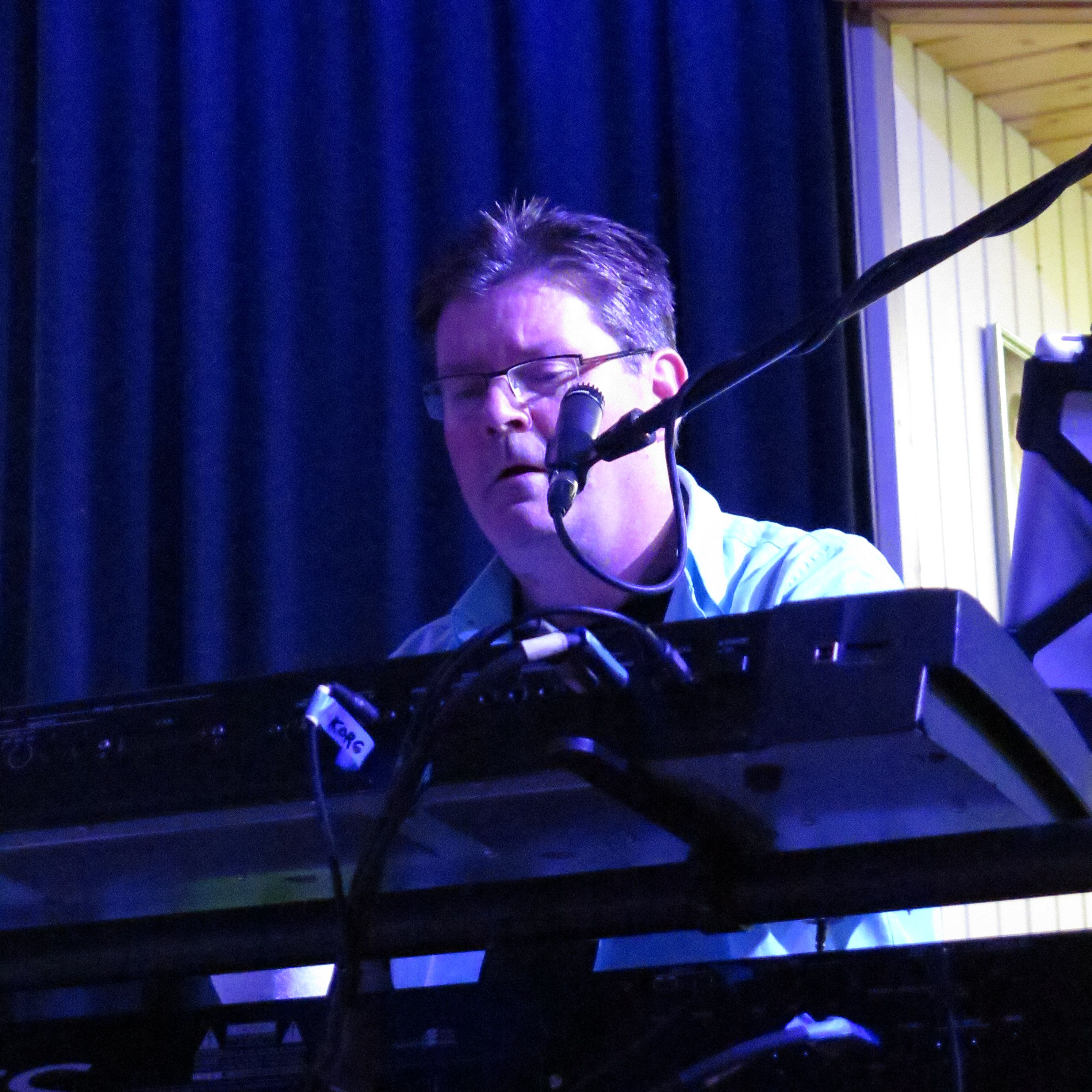 Jari Puhakka